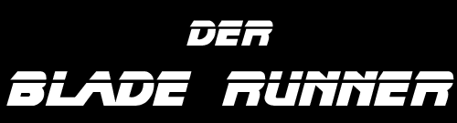 Blade Runner German Logo